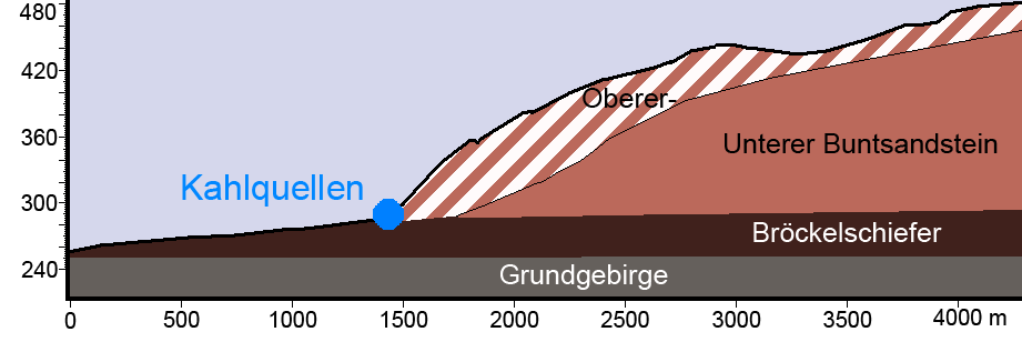 Querschnitt durch das Gebirge an den Kahlquellen. Die geologischen Schichten sind der Obere und Untere Buntsandstein, Bröckelschiefer und das Grundgebirge. Oberer Buntsandstein Unterer Buntsandstein Bröckelschiefer Grundgebirge